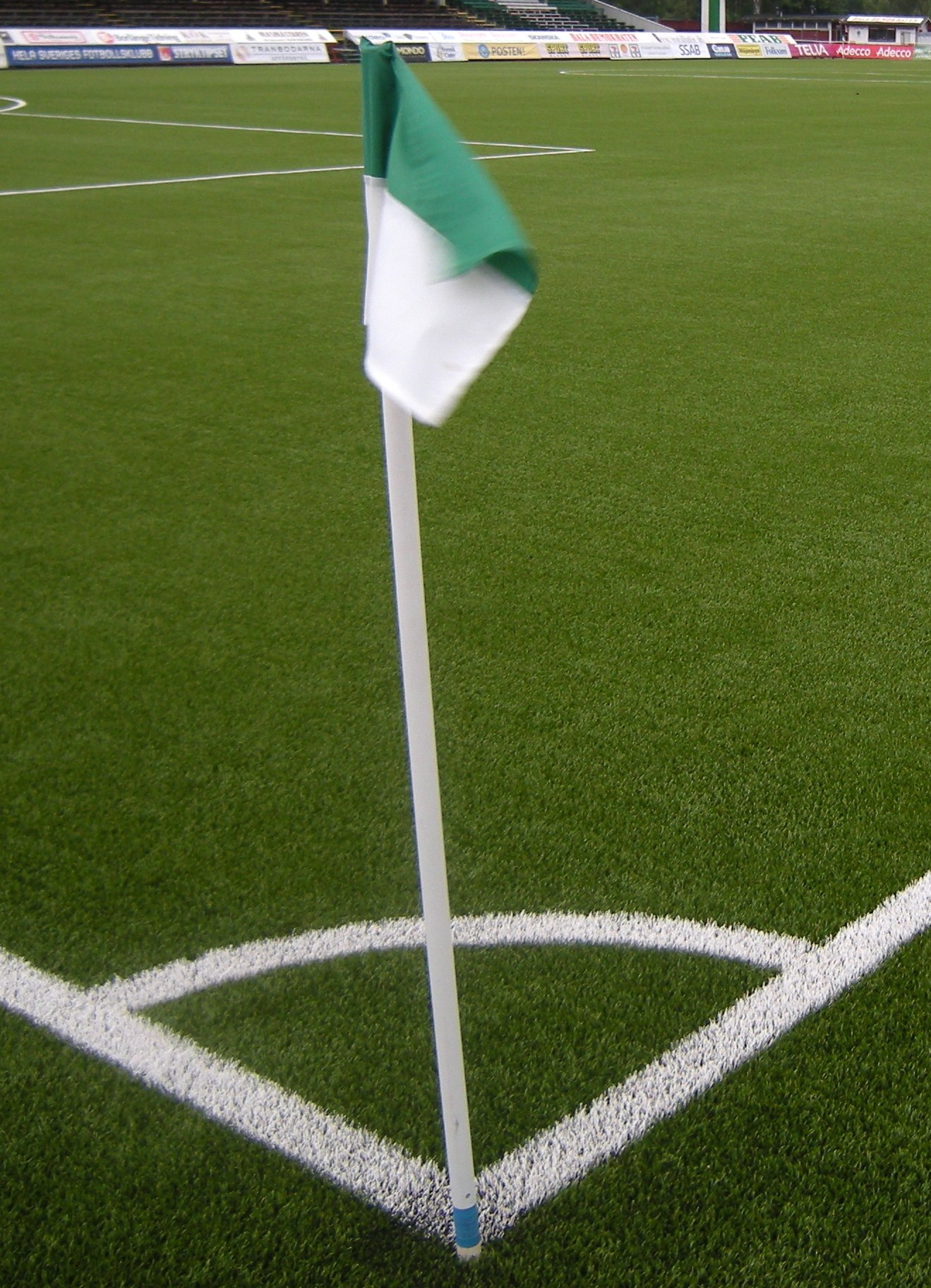 IK Brages hemmaarena Domnarvsvallen. Borlänge